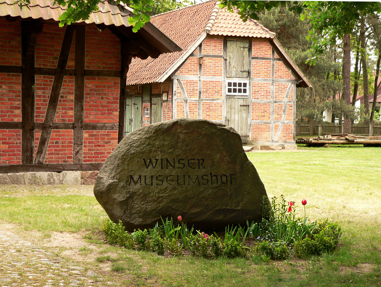 Museumshof Winsen Winsen Farm Museum, Lower Saxony, Germany.